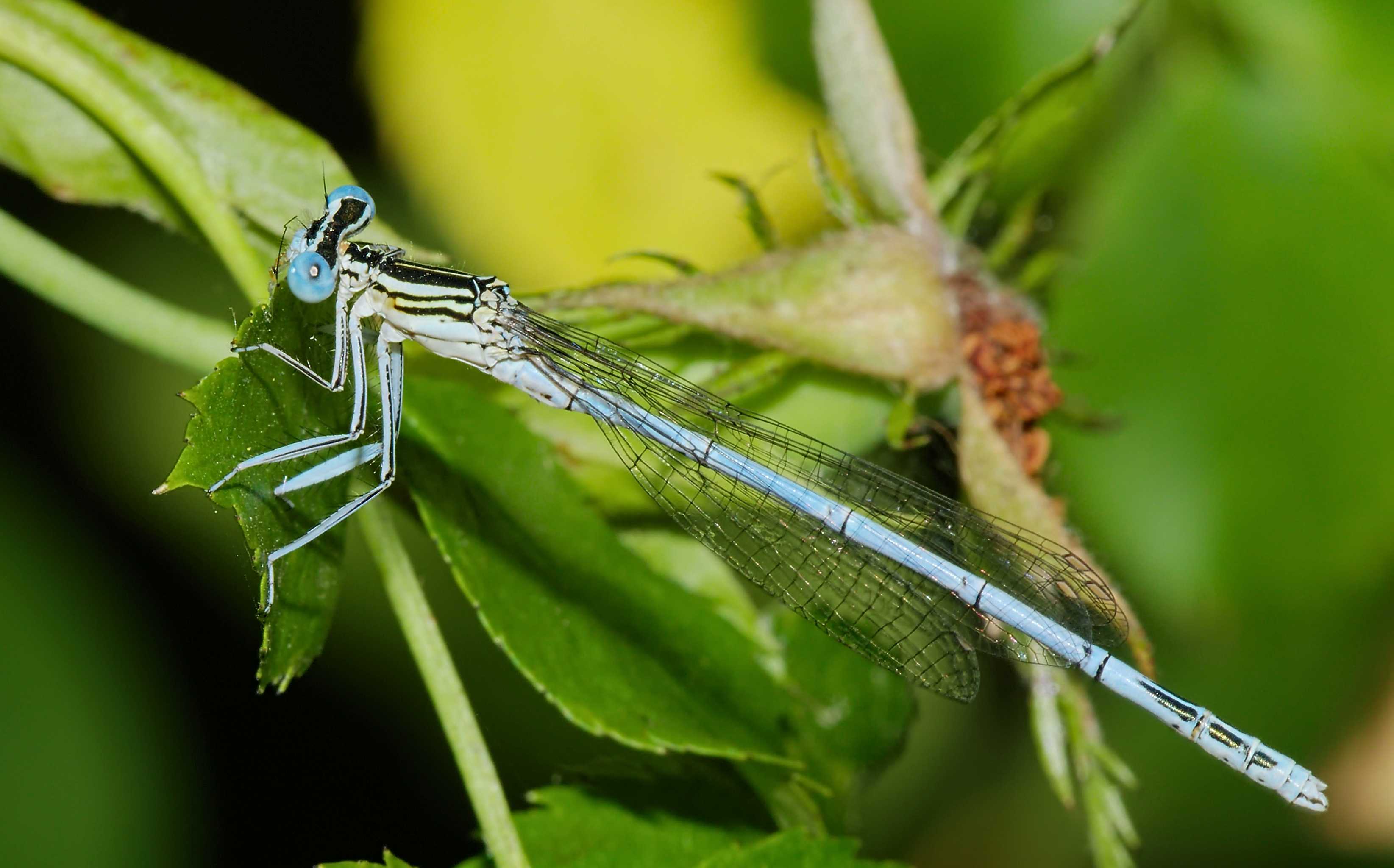 Blaue Federlibelle - Platycnemis pennipes, Männchen. Aufgenommen in Eilenburg-Ost, Sachsen, Deutschland.